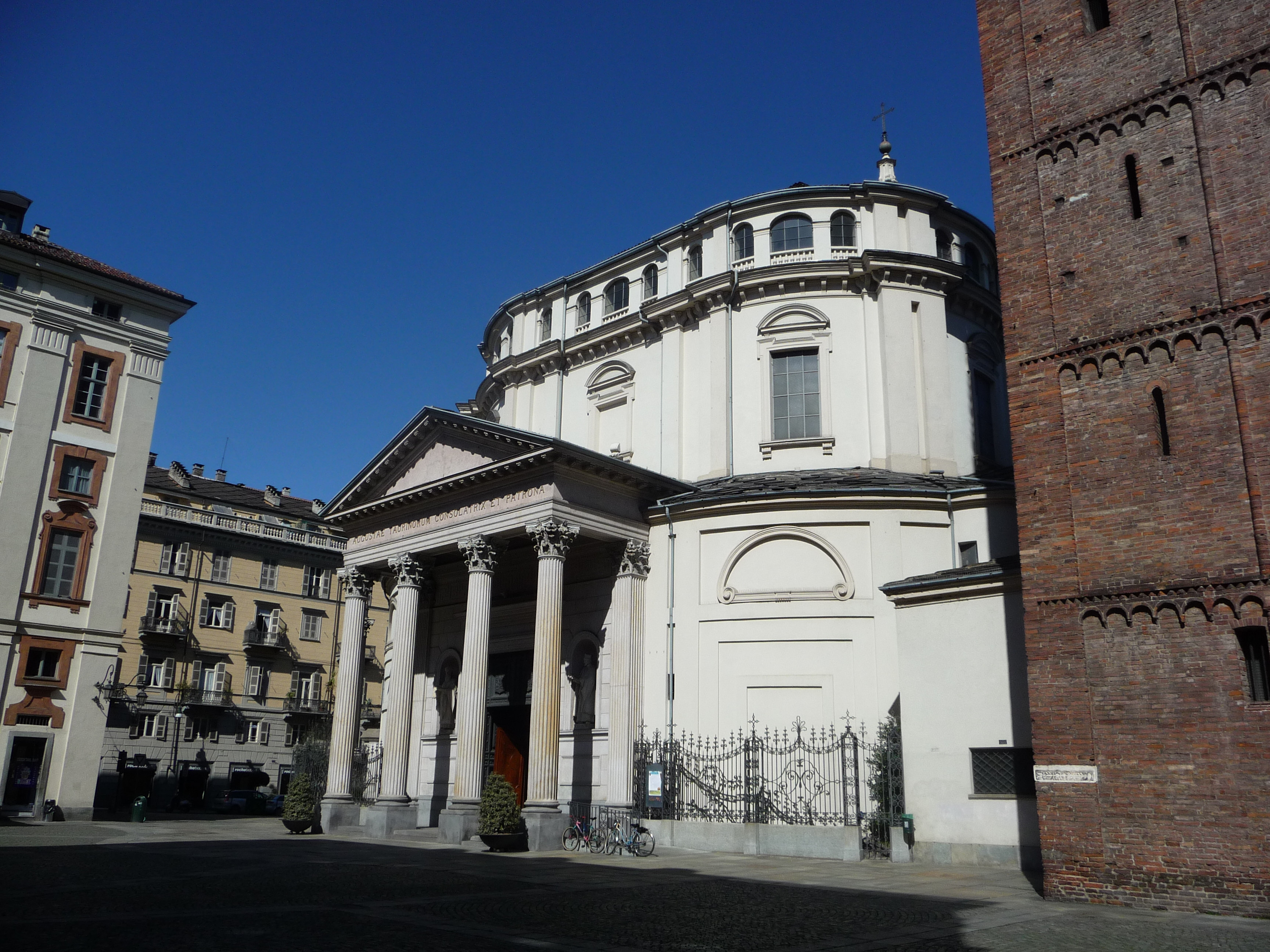 Santuario della Consolata di Torino, dalla Piazza della Consolata